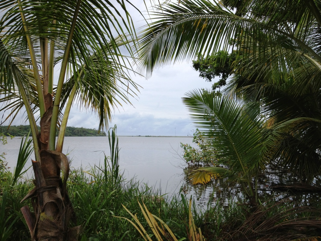 Ubicación de la Estación científica y casa de guarda parques en Isla Calero del Corredor Fronterizo Norte del Parque Nacional Tortuguero administrado por el Sistema Nacional de Áreas Silvestres Protegidas, obra hecha bajo la dirección técnica del arquitecto Ibo Bonilla, terminada en mayo del 2012. Vista hacia la Laguna Portillo y territorio nicaraguense al fondo.